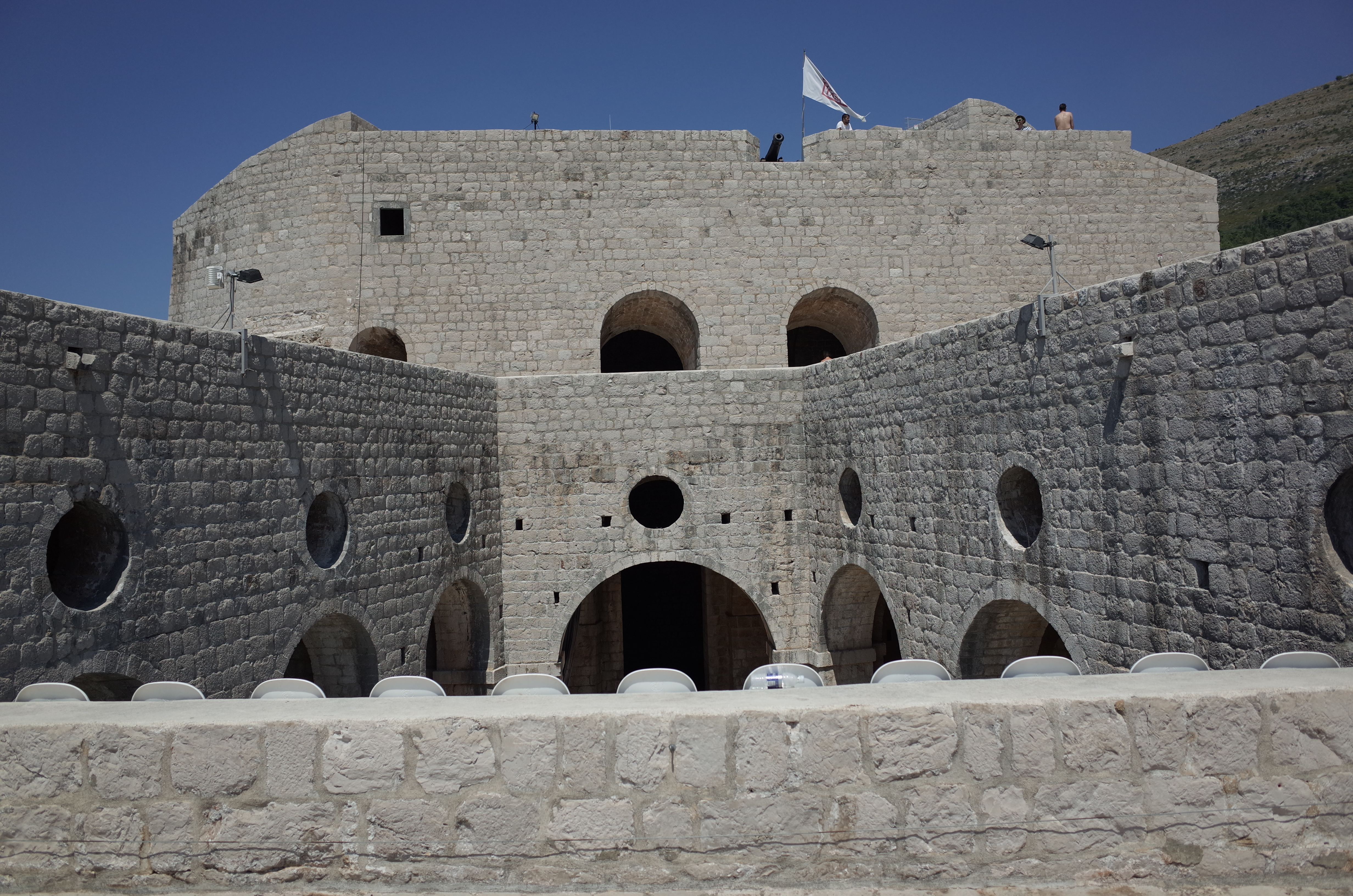 Festung Lovrijenac